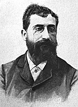 L'architetto Ernesto Basile